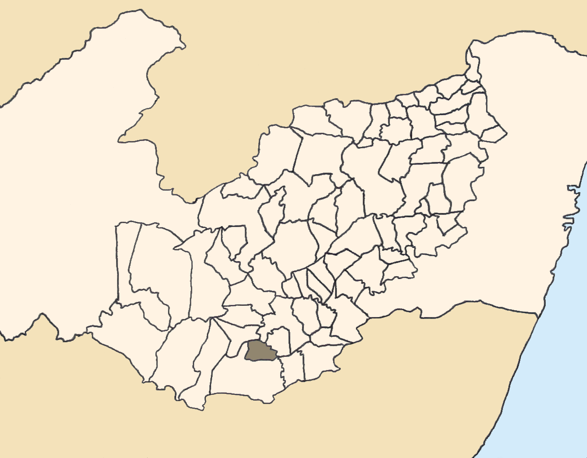 Mapa da mesorregião Agreste de Pernambuco (Brasil) subdivida em municípios. Em destaque, o município de Terezinha. Map of the brazilian state of Pernambuco (mesorregião Agreste) showing the city of Terezinha. Imagem tratada com o GIMP. Image made with GIMP.